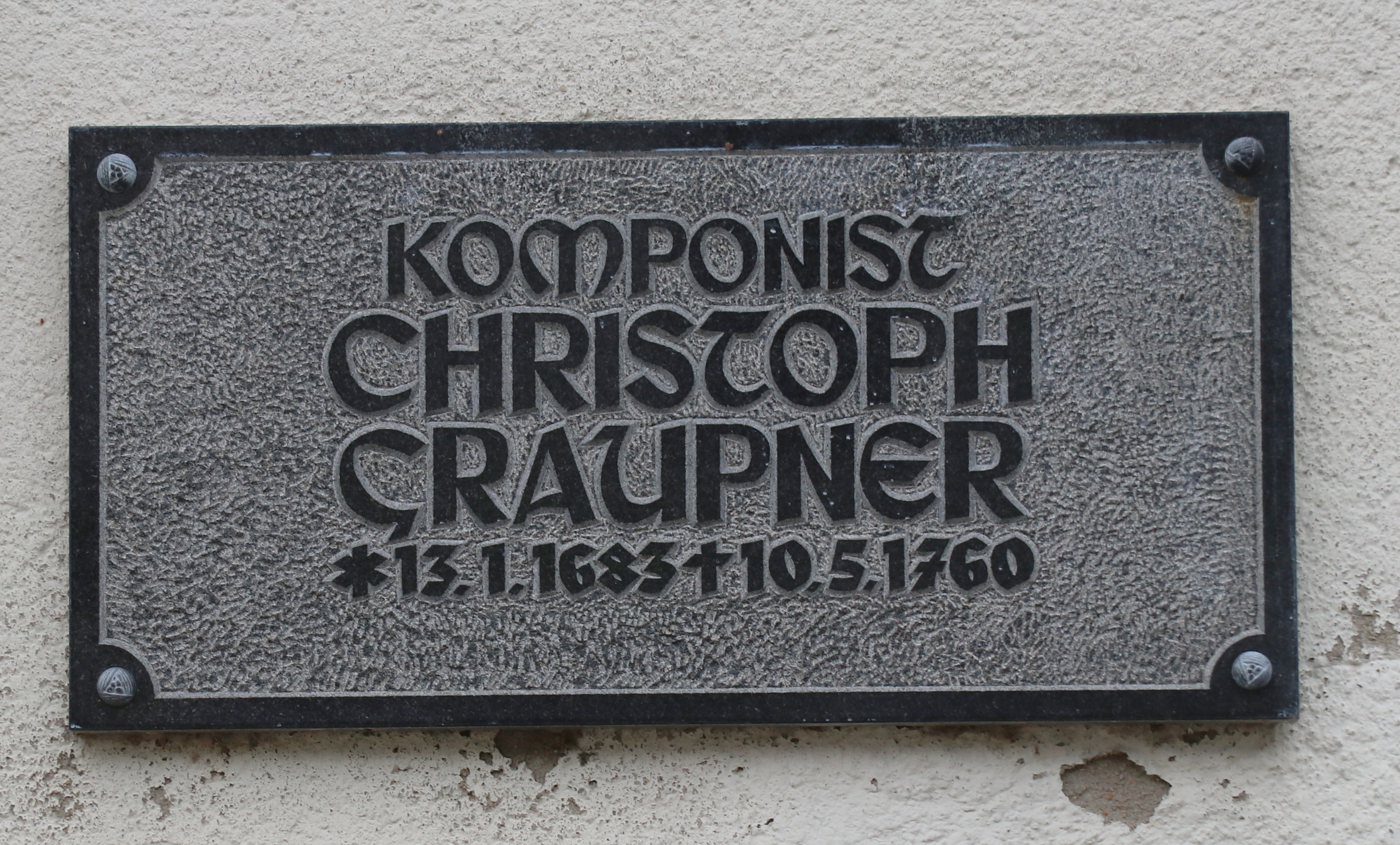 Gedenktafel für Johann Christoph Graupner am denkmalgeschützten Gebäude Neumarkt 11 in Kirchberg (Sachsen)